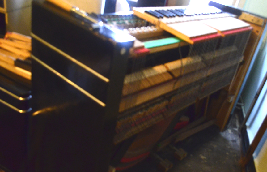 Voordat de minipiano kan opengemaakt worden moet men de deksel volledig eraf halen.